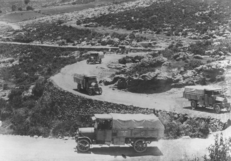 ADN-ZB/Archiv/N1/Schm I. Weltkrieg 1914 - 1918 Orientalischer Kriegsschauplatz 1916: Deutsche Heeres-LKW überqueren den Taurus (Türkei).